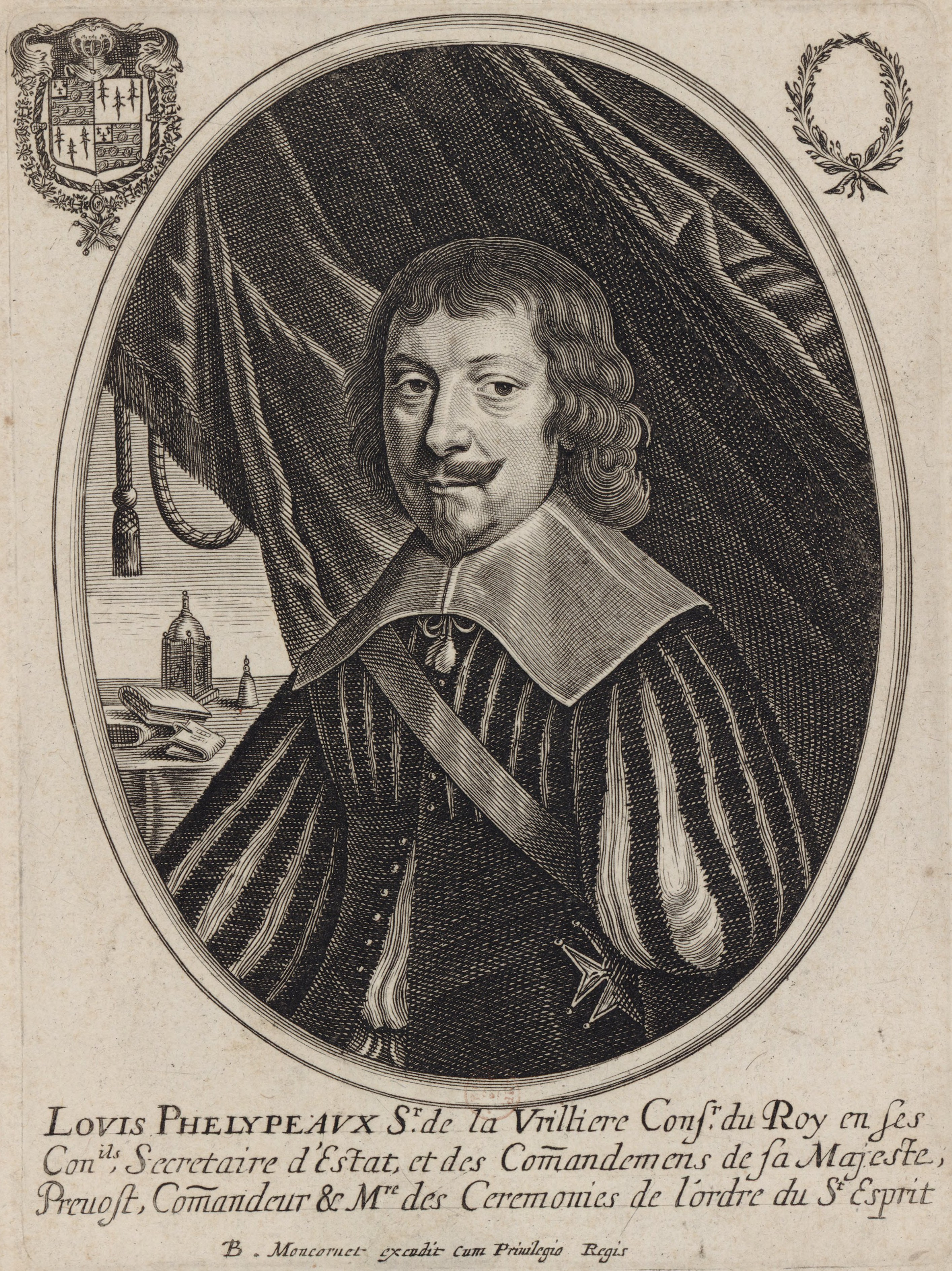 Louis Phélypeaux de La Vrillière, secrétaire d'Etat de la religion prétendue réformée Depicted person: Louis Phélypeaux, seigneur de La Vrillière – French politician